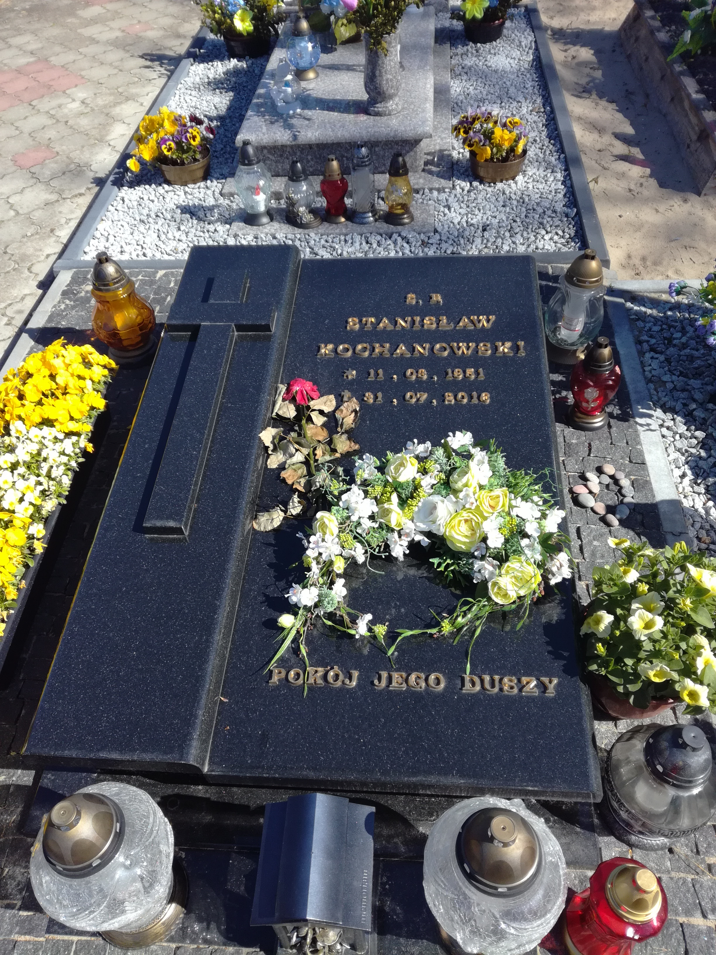 Grób Stanisława Kochanowskiego na cmentarzu w Sztutowie